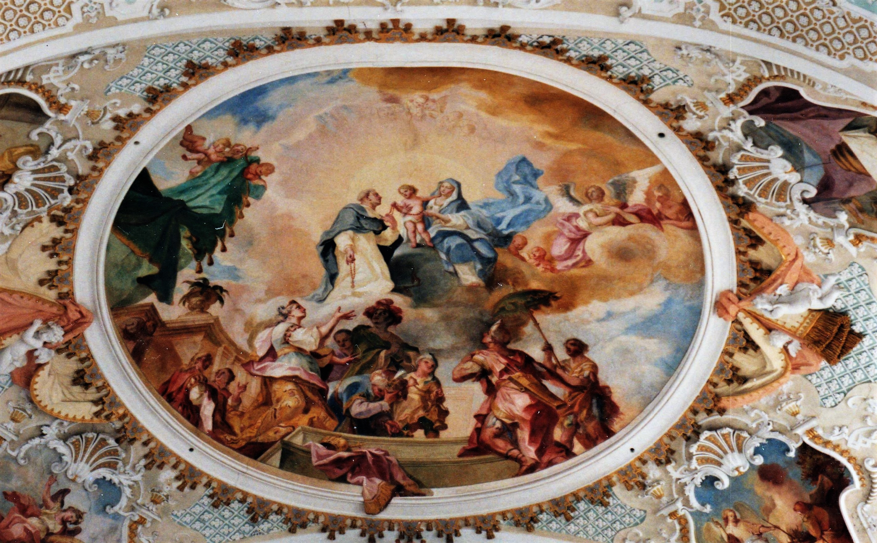 Klosterkirche Sießen, Fresko (1729): Rosenkranzübergabe an den heiligen Dominikus